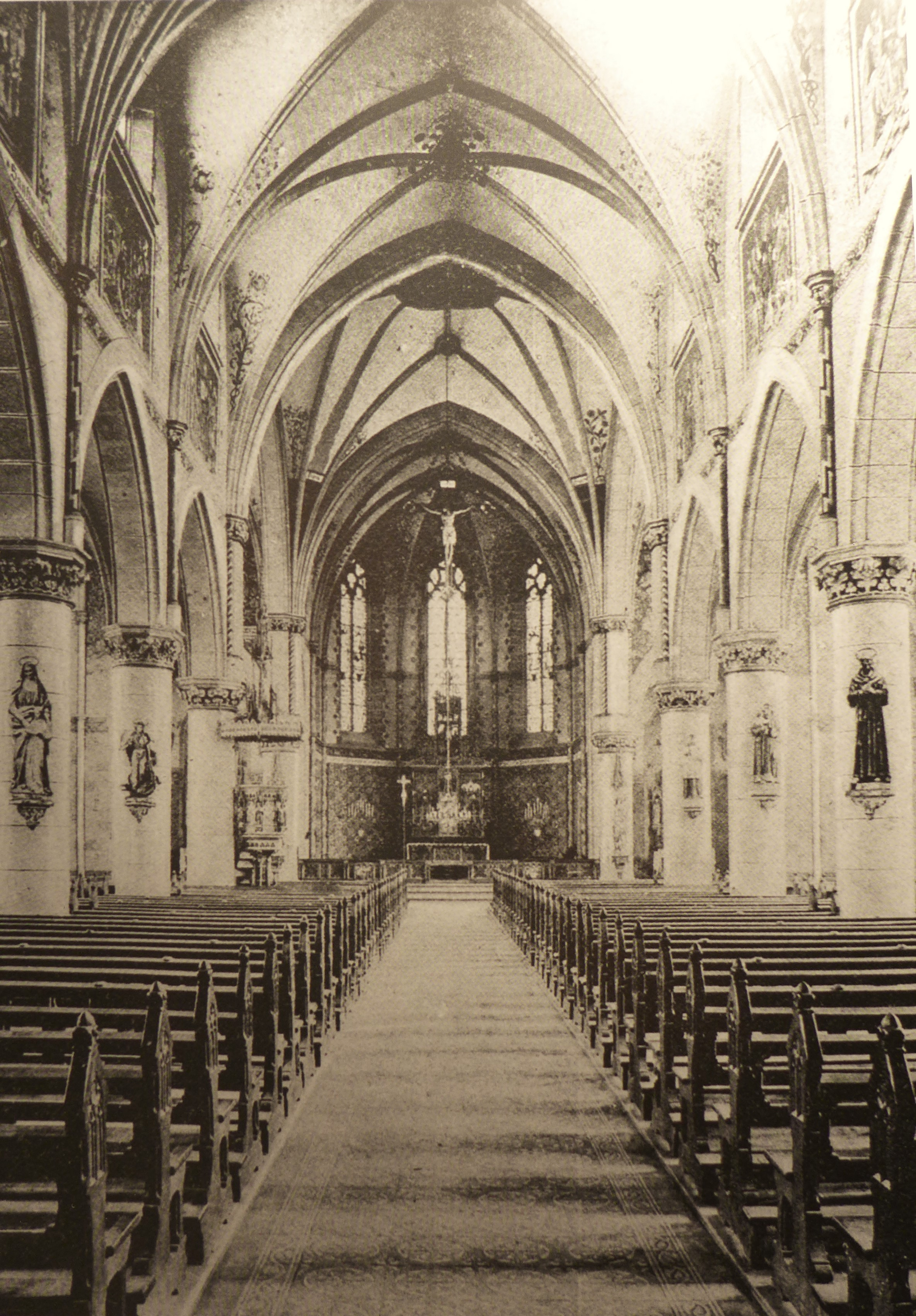 Roden, Mariä Himmelfahrt, neogotische Kirche des Rodener Architekten Wilhelm Hector, erbaut in den Jahren 1898–1900, zerstört im Zweiten Weltkrieg, in den Jahren 1949–1950 stark verändert wiederaufgebaut durch die Saarwellinger Architekten Toni Laub und Heinrich Latz, Bildarchiv Amt für kirchliche Denkmalpflege Trier